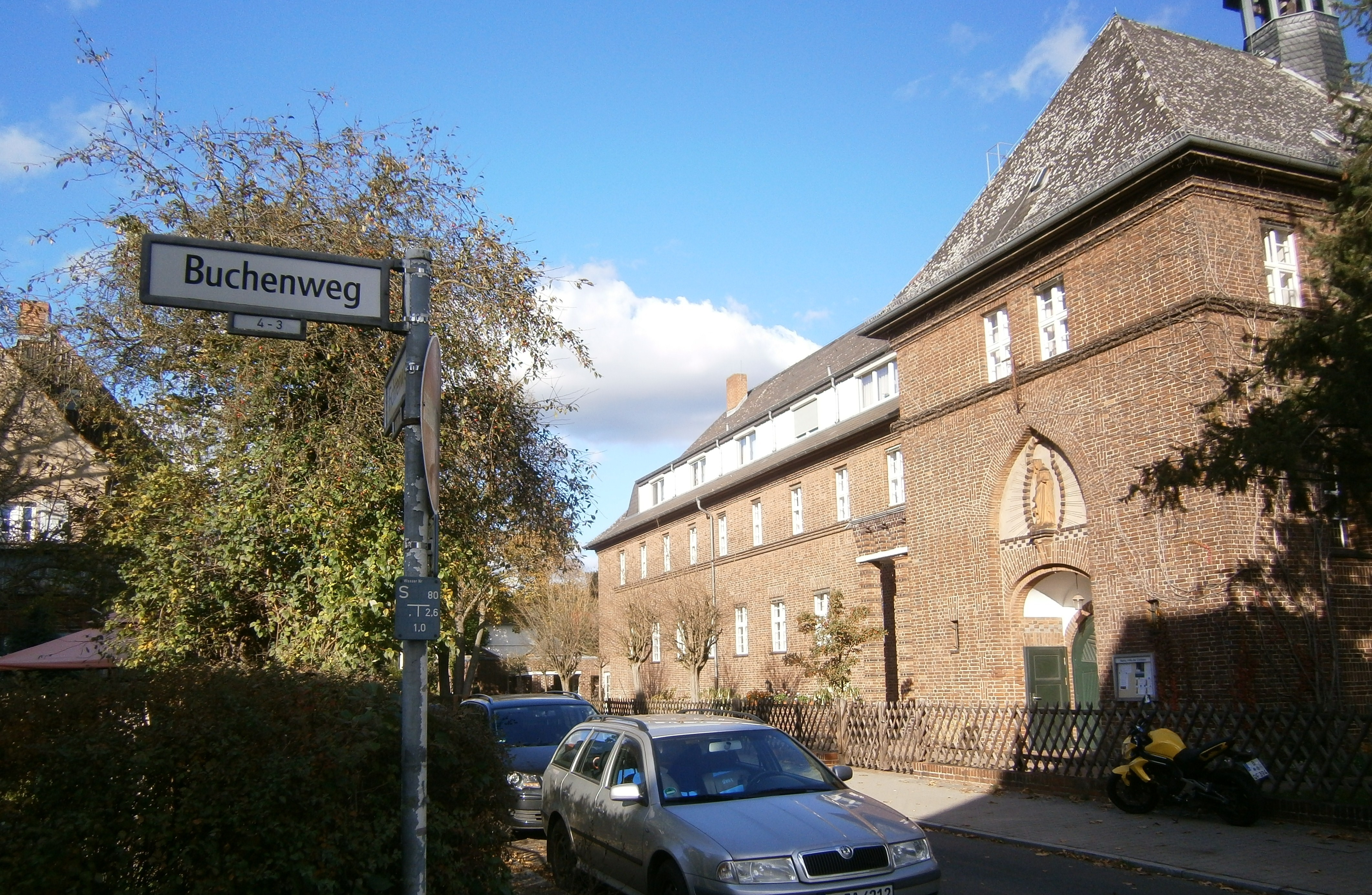 Fichtenweg ist eine Straße im Berliner Ortsteil Hakenfelde.Streets in Berlin-Hakenfelde - Rechts das katholische Seniorenheim St. Elisabeth.